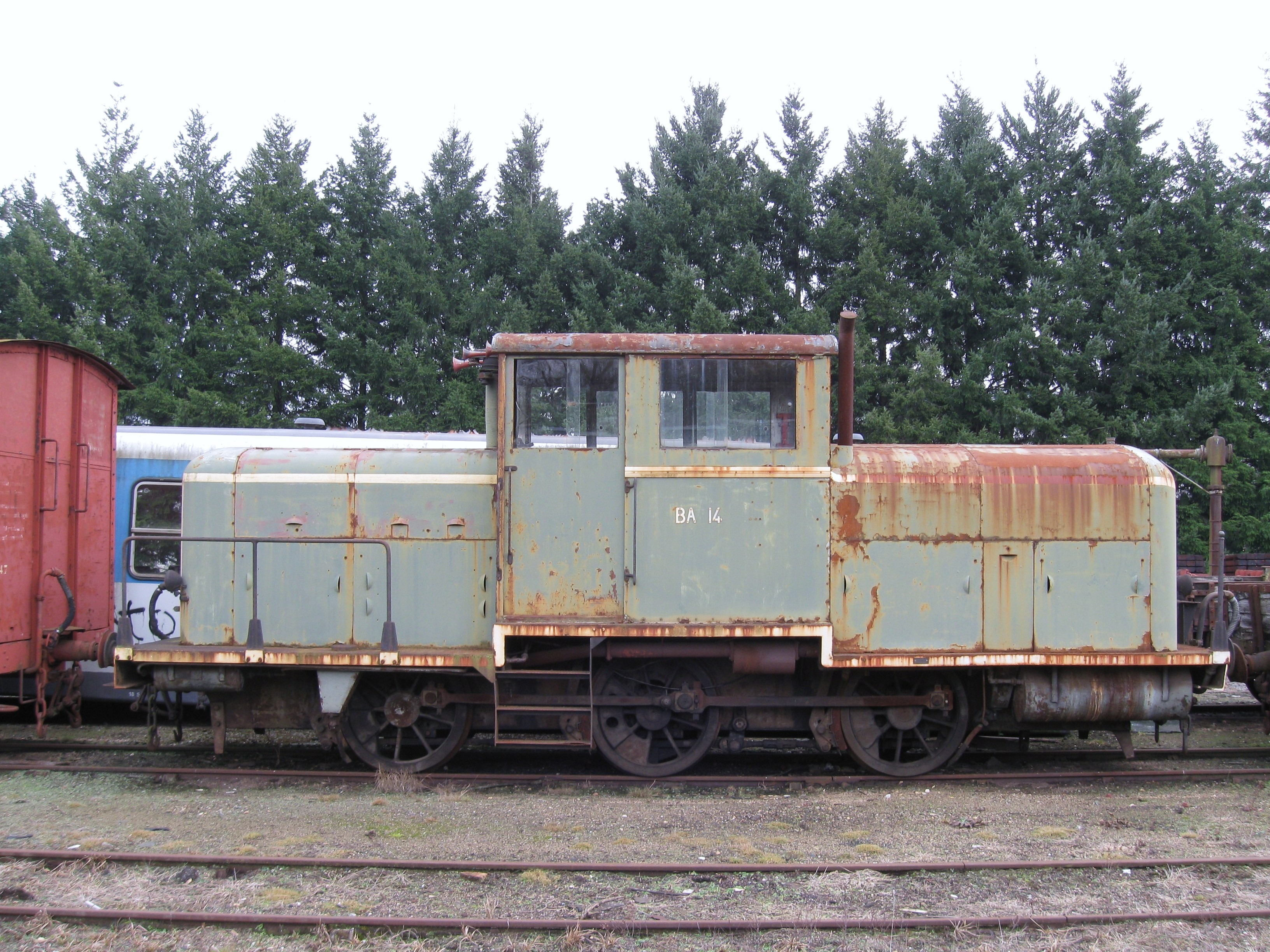 Ancien locotracteur diesel (BA 14) sur une voie de garage en gare de Romorantin-Blanc-Argent (chemin de fer à voie métrique du Blanc-Argent), Romorantin-Lanthenay, Loir-et-Cher, France